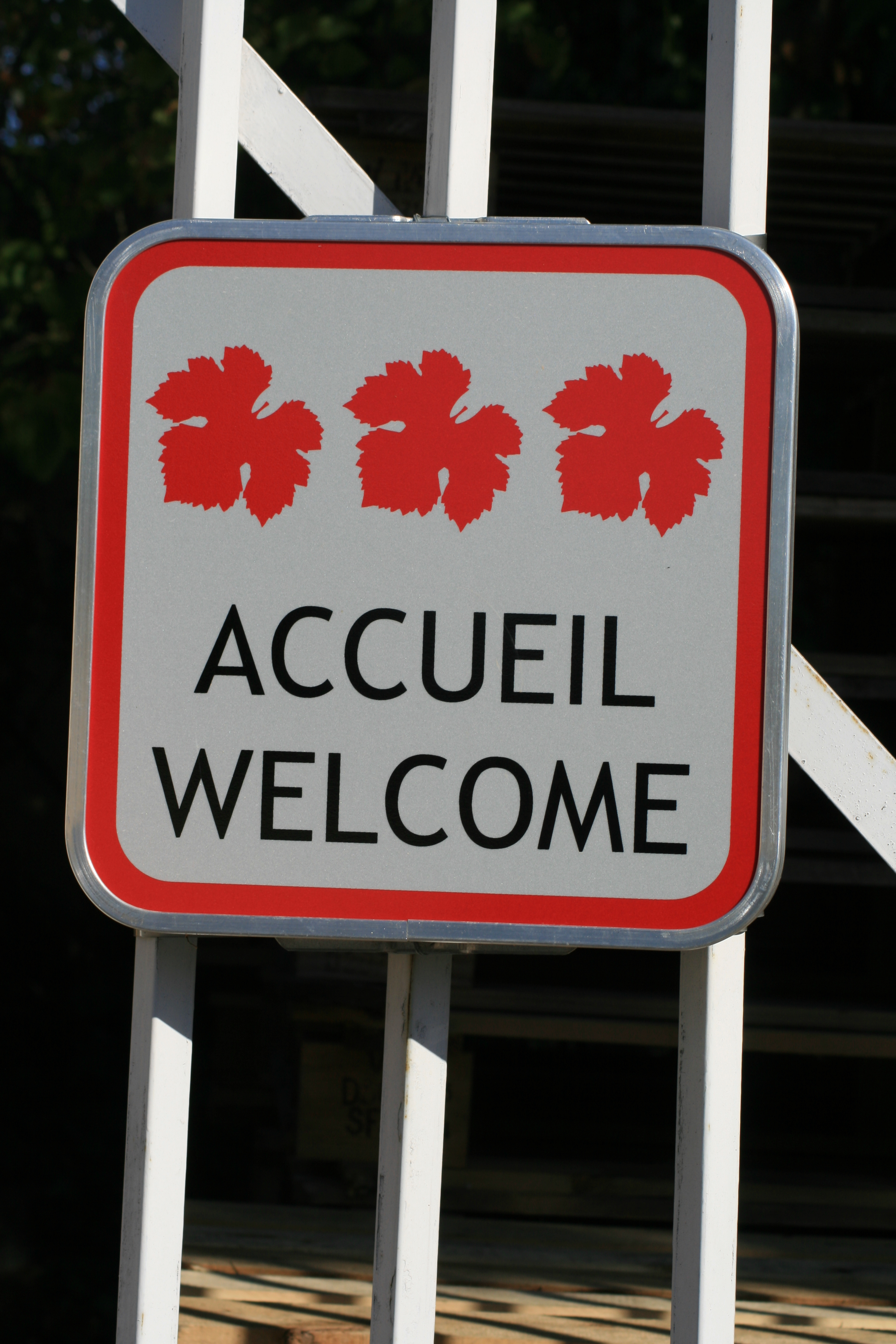 Signalitique d'une cave à Châteauneuf-du-Pape